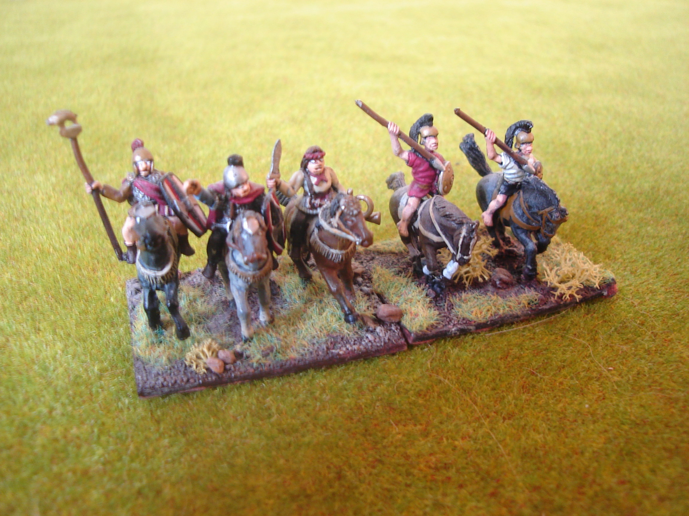 Una unidad de C-in-C (general en caballería) junto a 2LH (Caballería ligera) del ejercito celtíbero para las reglas de DBA ("De Bellis Antiquitatis") A C-in-C(Chief in Cavalry) with a 2LH from a celtiberian army under DBA ("De Bellis Antiquitatis") wargamin rules